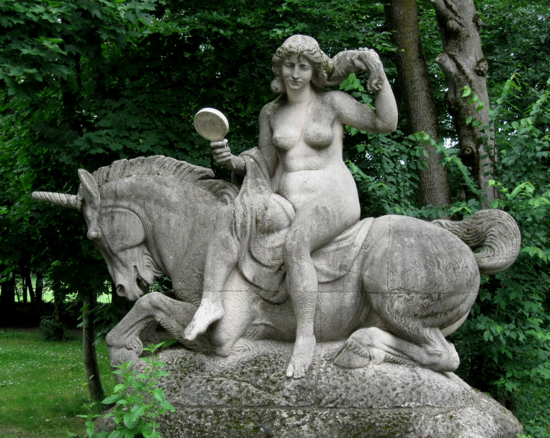 "Schönheit" (Jungfrau auf Einhorn), von Hermann Hahn, Bavariapark München